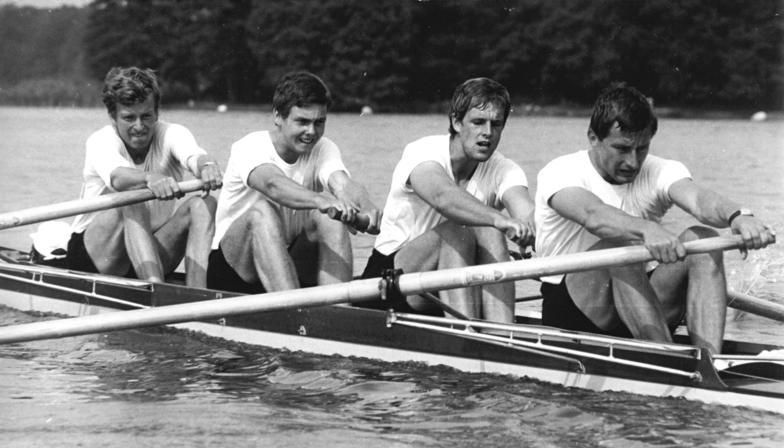 U. Diessner, U. Kons, H. Sennewald, T. Greiner ADN-ZB Mittelstädt 29.8.82 Luzern-Schweiz: Weltmeisterschaften im Rudern- Der DDR-Vierer mit Steuermann holte sich auf dem Rotsee in der Besetzung mit Schlagmann Ullrich Diess:ner, Ulrich Kons, Hans Sennewald, Thomas Greiner und Steuermann Andreas Gregor (v.r.n.l.-Foto vom WM-Abschlußtraining in Berlin-Grünau) die Goldmedaille.